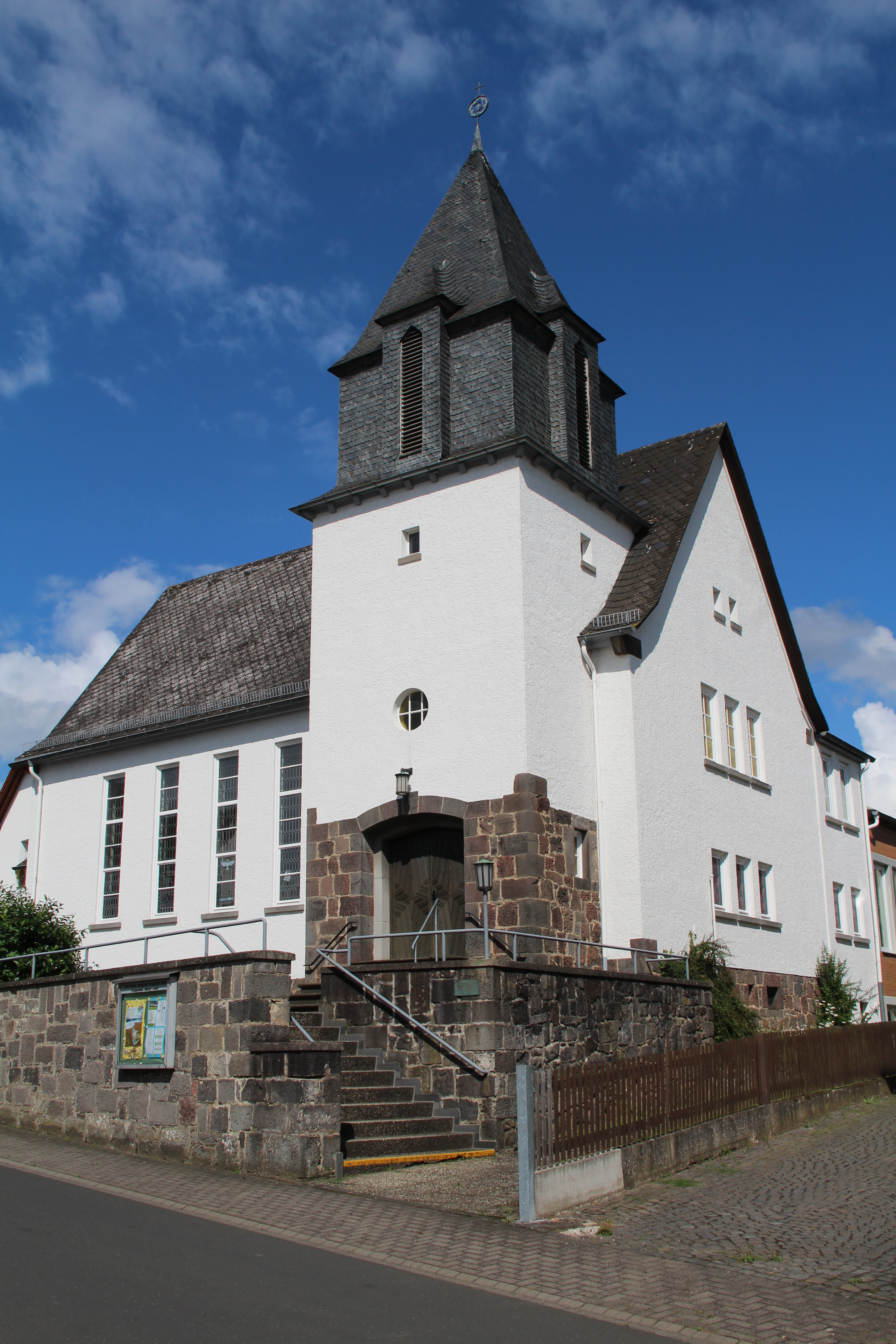 Kirche der Evangelisch-Lutherischen Zionsgemeinde